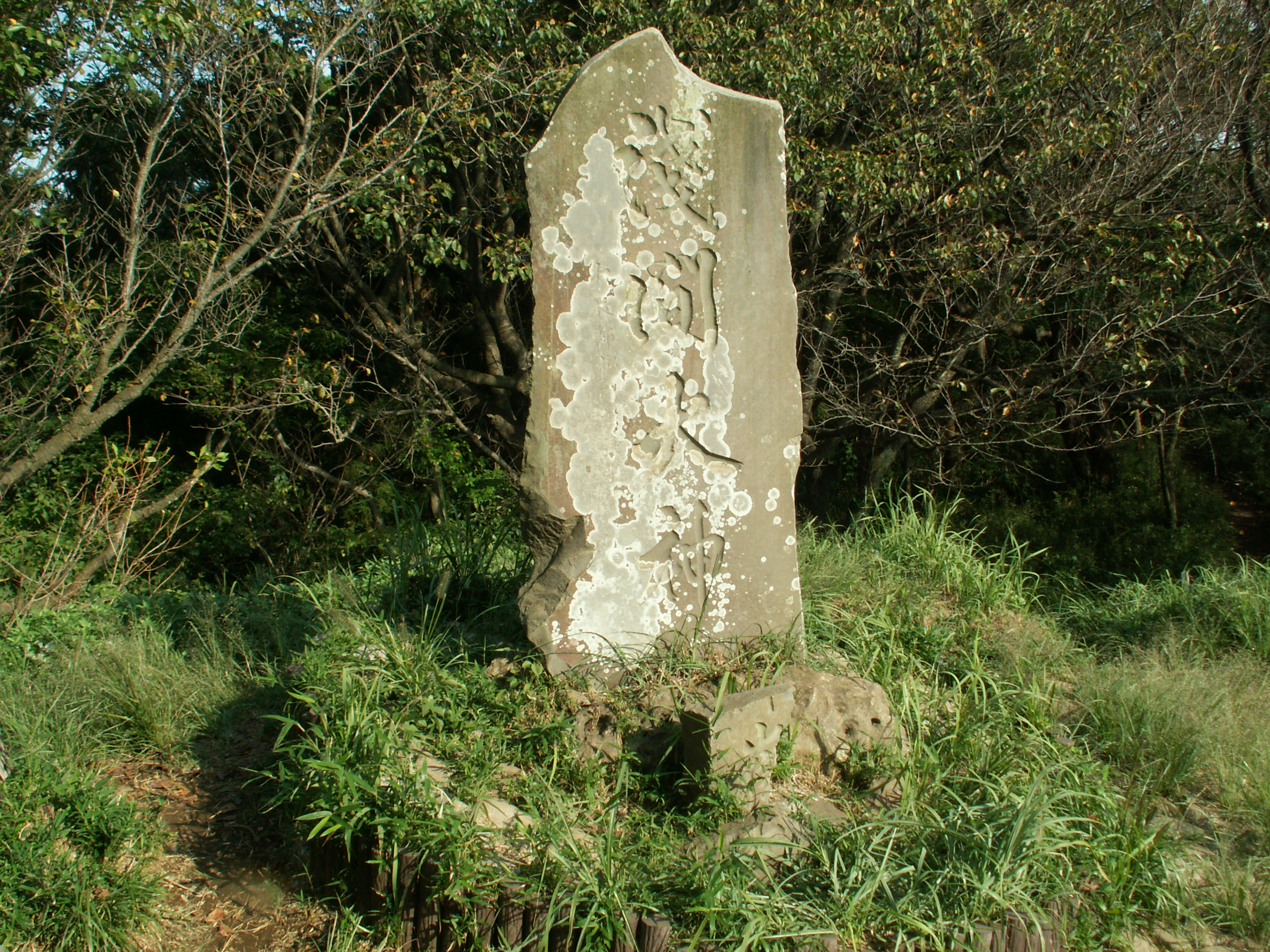 六国見山山頂にある、浅間大神の石碑